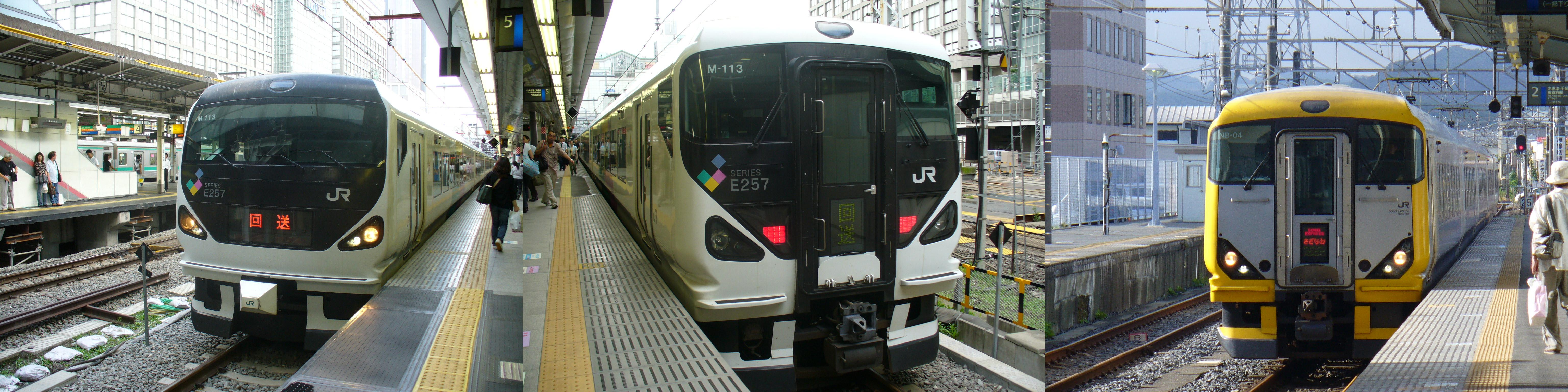 左E257系0番台 2007年7月22日新宿にて撮影 中E257系0番台貫通車 2007年7月22日新宿にて撮影 右E257系500番台 右は2007年9月9日館山にて撮影